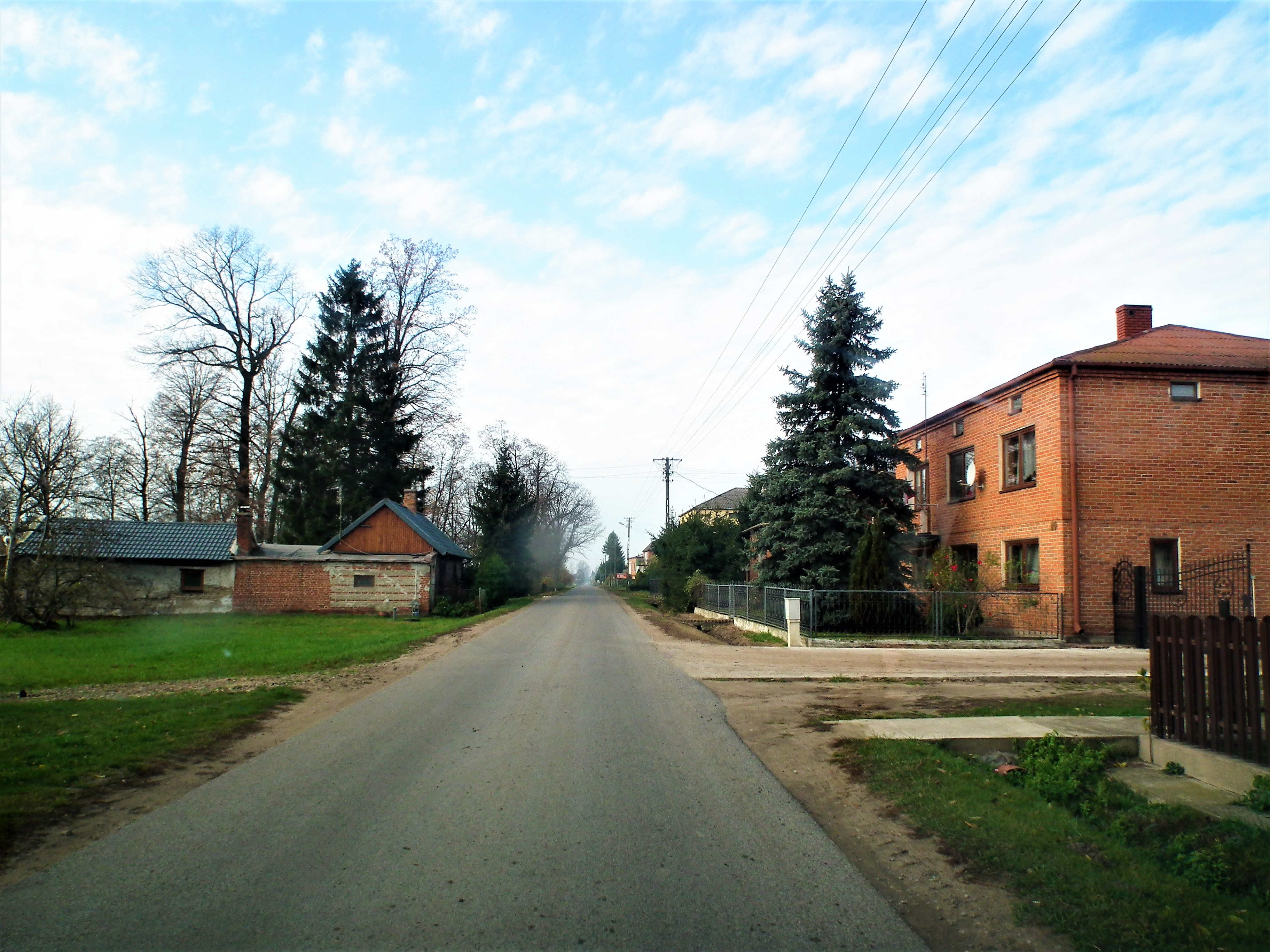 Strugienice.